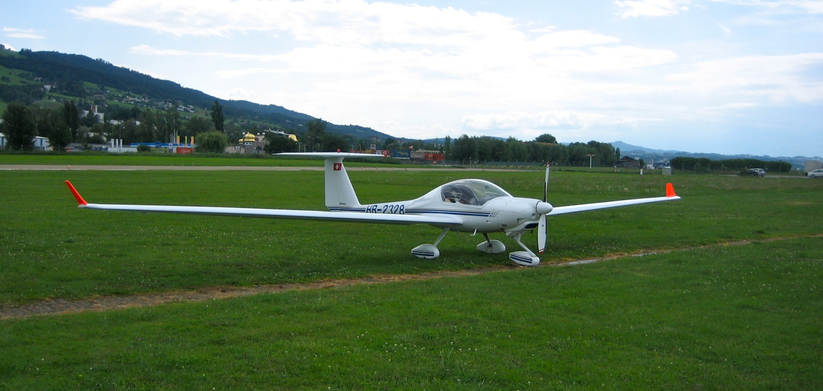 Diamond HK36 TTC «Super Dimona»-Motorsegler